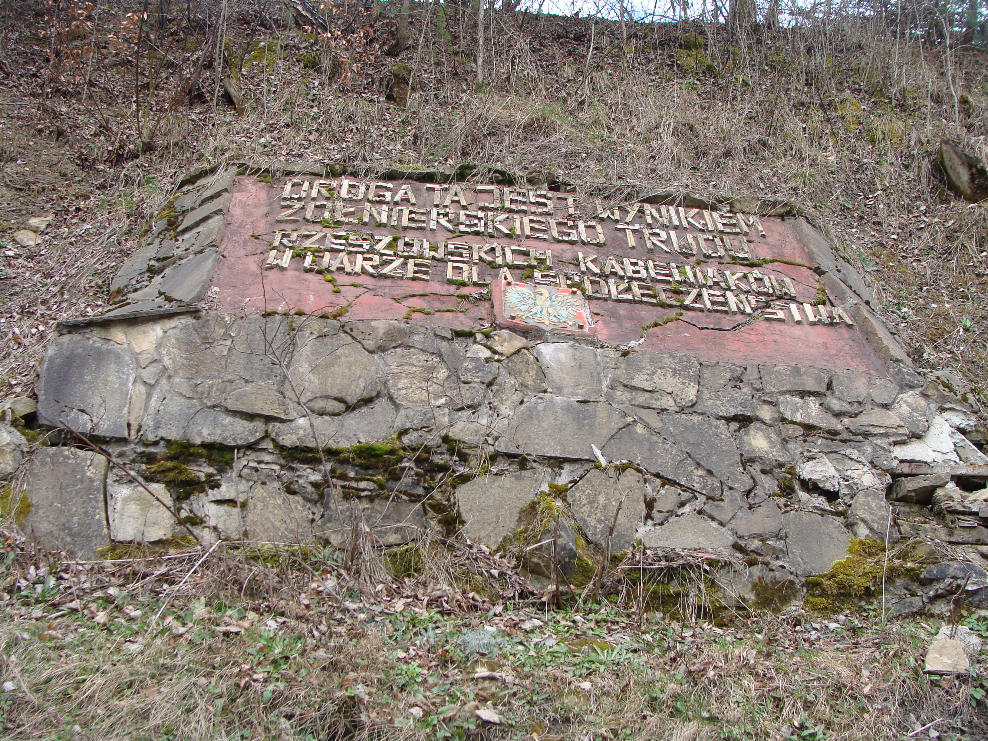 Płyta upamiętniająca budowę dróg w Bieszczadach przez żołnierzy Korpusu Bezpieczeństwa Wewnętrznego.